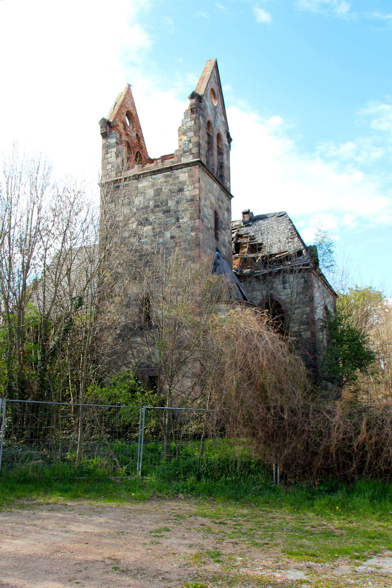 Fernsdorf ist ein Ortsteil von Prosigk, welches ein Ortsteil der Gemeinde Südliches Anhalt in Sachsen-Anhalt, Deutschland ist.